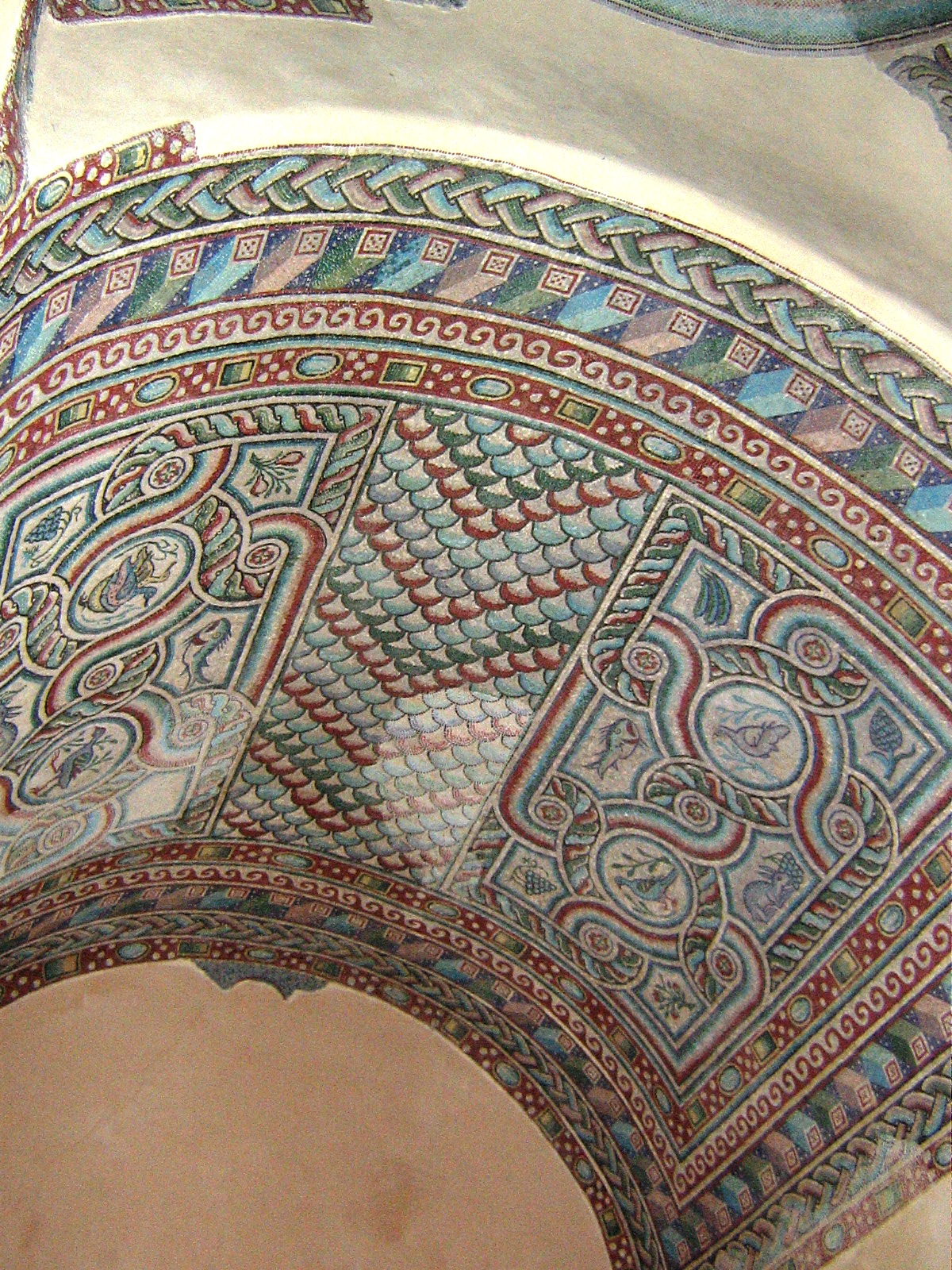 Chiesa di Casaranello Affreschi